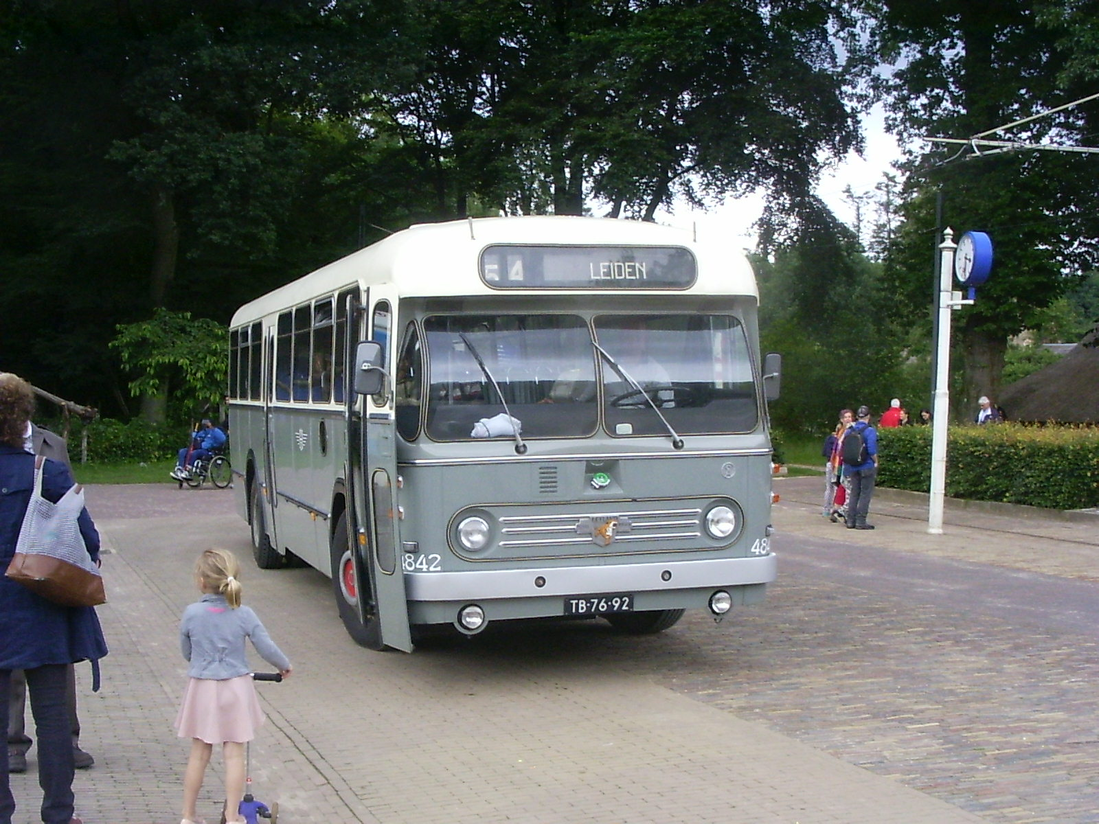 Arnhem, Openluchtmuseum, NZH 4842 bolramer. Kenteken TB-76-92. Eigenaar Haags Openbaar Vervoermuseum